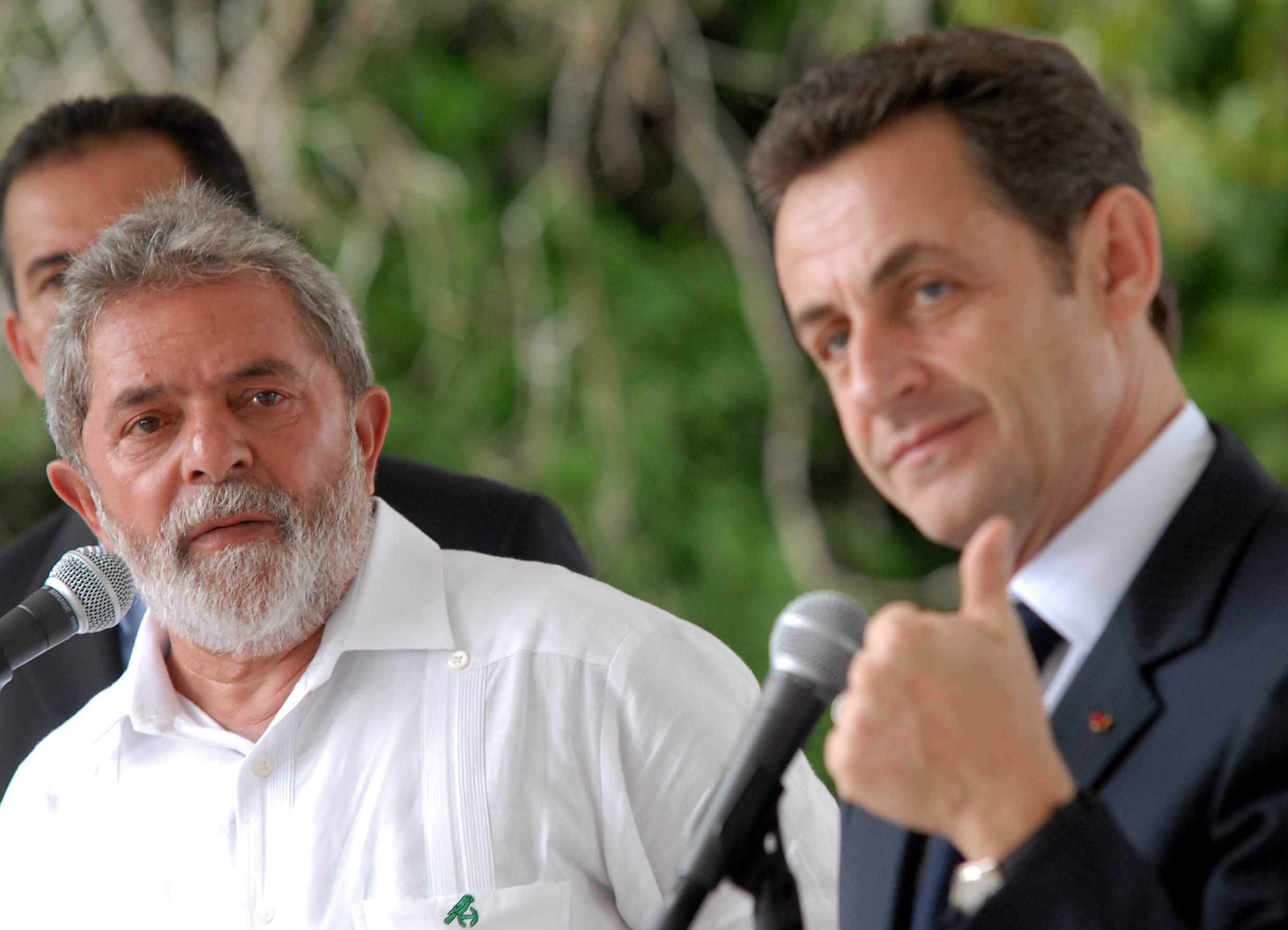 São Jorge do Oiapoque (Guiana Francesa) - Presidente Lula e o presidente da França, Nicolas Sarkozy durante entrevista coletiva